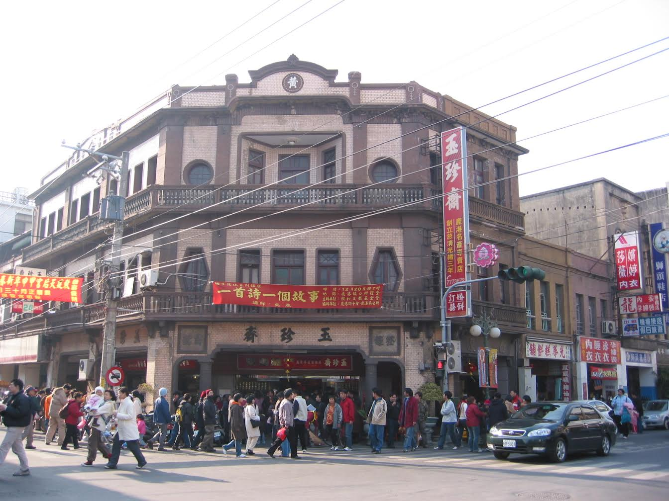 玉珍齋本體建築於日治昭和5年(西元1930年)建造完成